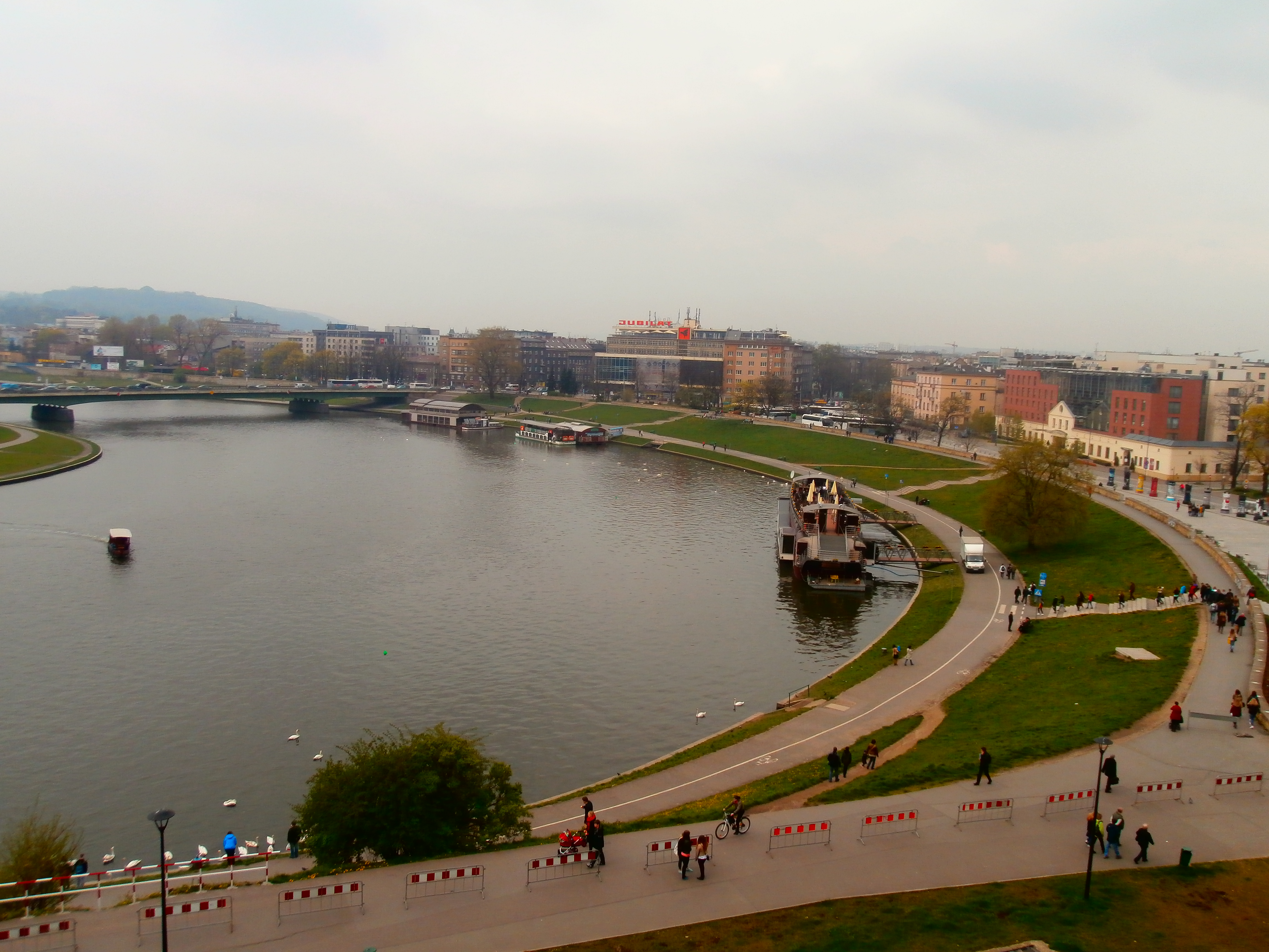 Widok z Wawelu na Bulwar Czerwieński, Wisłę i Most Dębnicki w Krakowie.